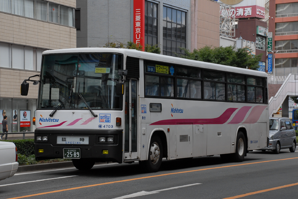 ドーム臨時 2007-8-28撮影